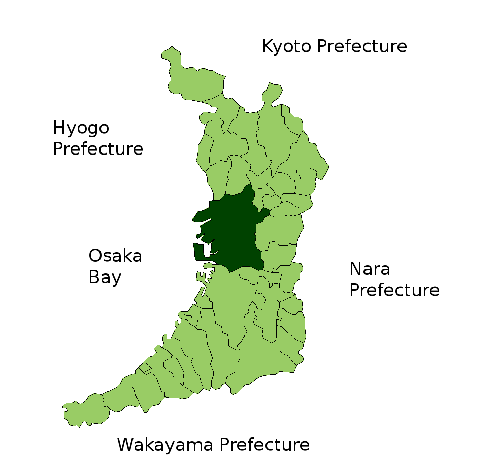 Location Map of Osaka in Osaka-fu, Japan